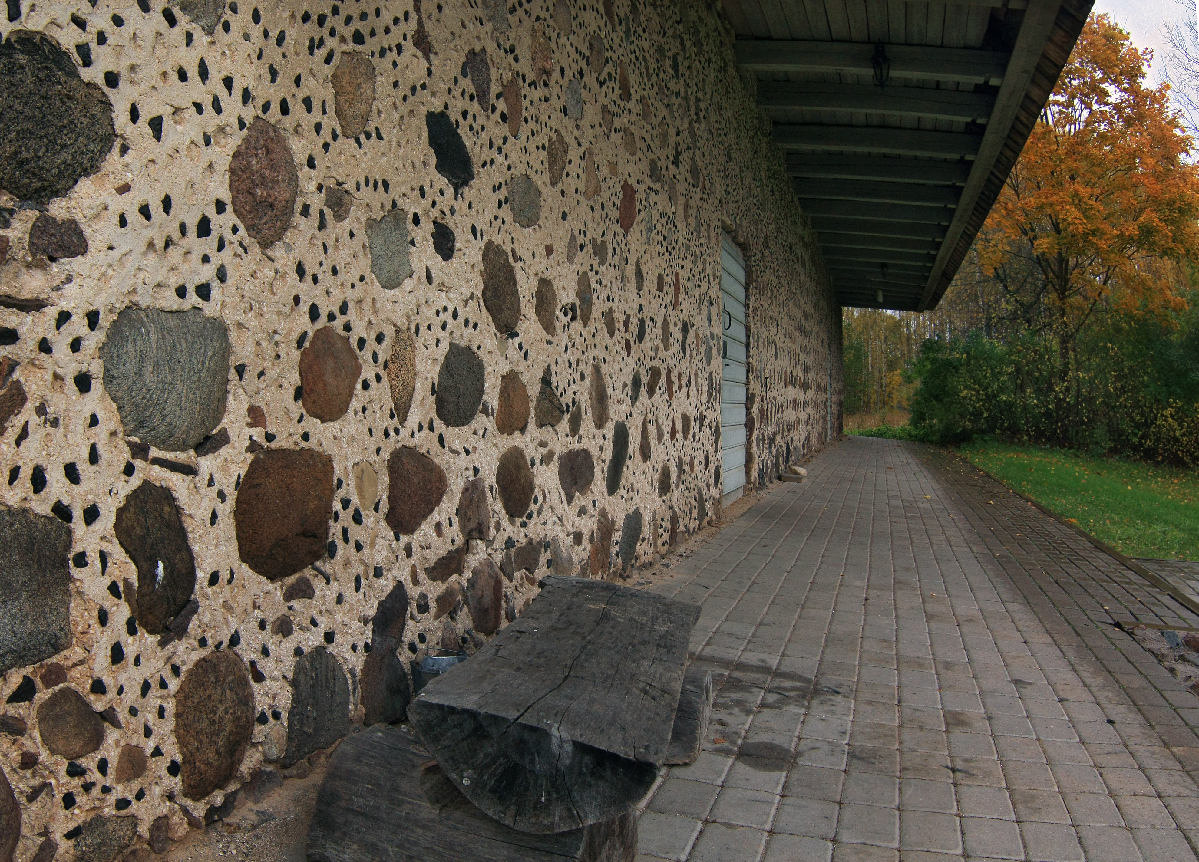 Maakividest Holstre magasiait